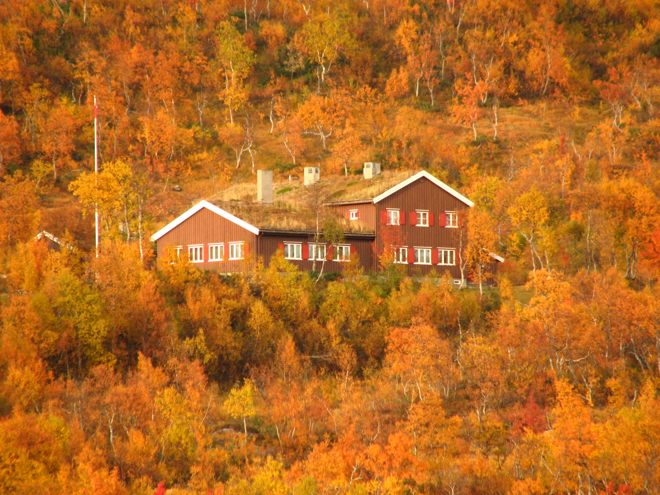 Nedalshytta i Sylan i Sør-Trøndelag